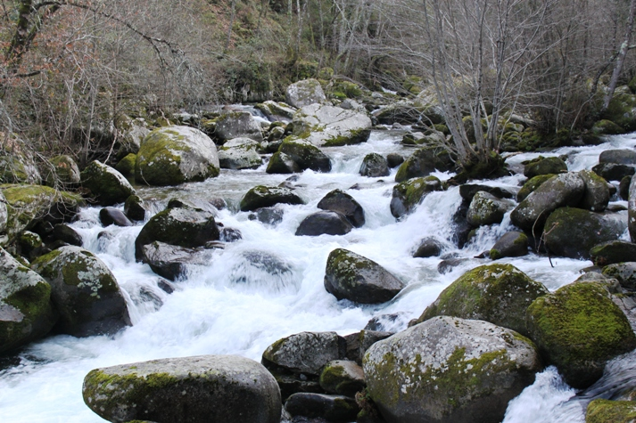 Rio Bestança - Enxidrô